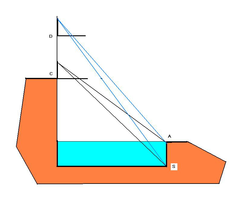 Sea Island Math Manual Q7 diagram 海岛算经Q7 望清渊示意图